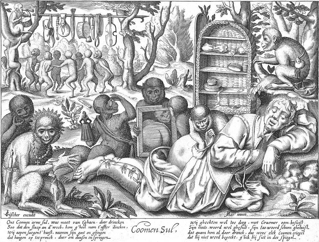 De slapende koopman en de apen Alternative title(s): Coomen Sul.